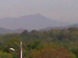 Gunung Tapis.